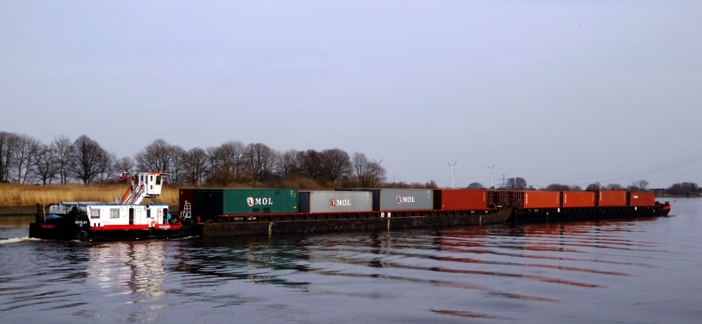 Schubverband mit Containerladung auf der Elbe